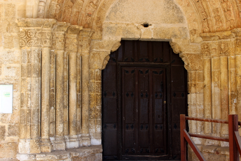 Urizaharreko Andre Mariaren Jasokundearen Elizaren ataria